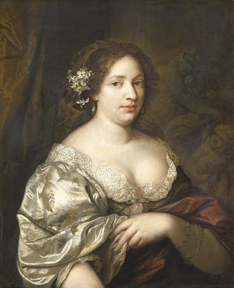 Margaretha Godijn, vrouw van kunstschilder Caspar Netscher (1639-1684)